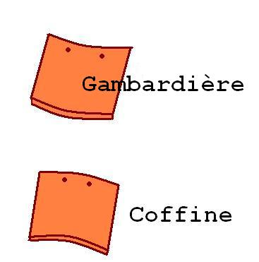 Coffine (ou cofine) et gambardière de couverture de toit.